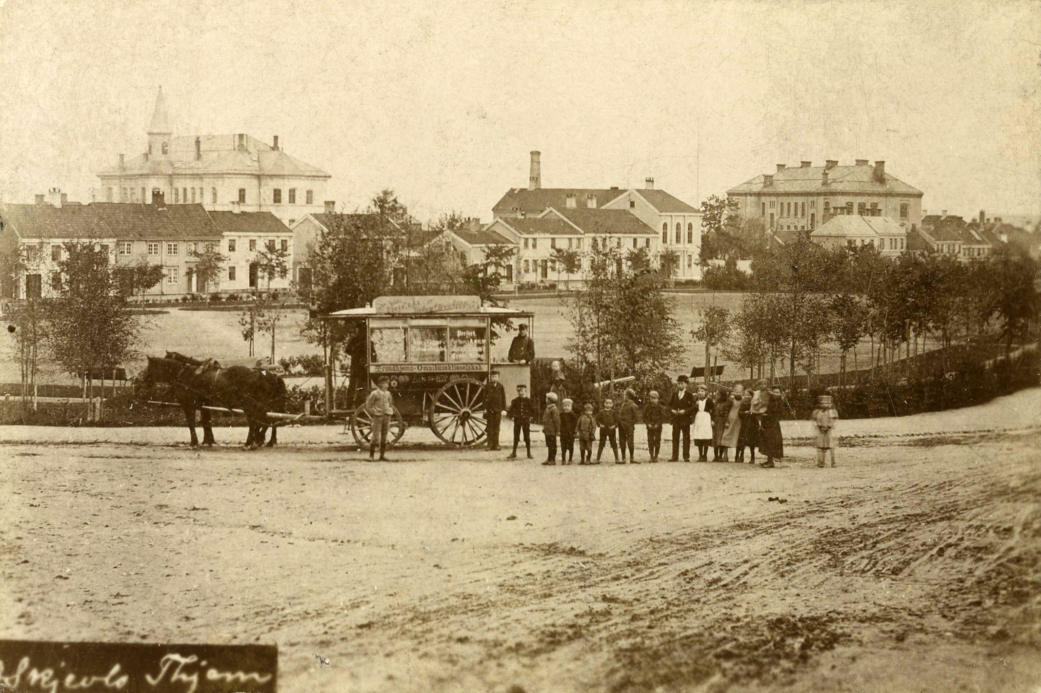 Format: Fotopositiv. En av vognene til Trondhjems Omnibusaktieselskab ved Ilevollen i 1896. Fotograf: Skjevlo